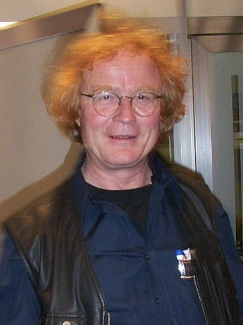 Tilman Röhrig auf der Buchmesse 2002 in Frankfurt